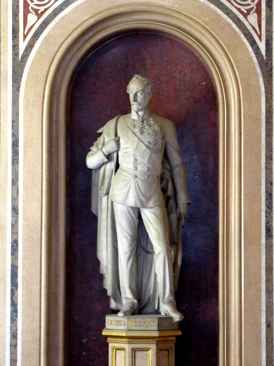 Statue des Fürsten Alfred I. zu Windisch-Graetz im Stiegenhaus des Heeresgeschichtlichen Museums in Wien.